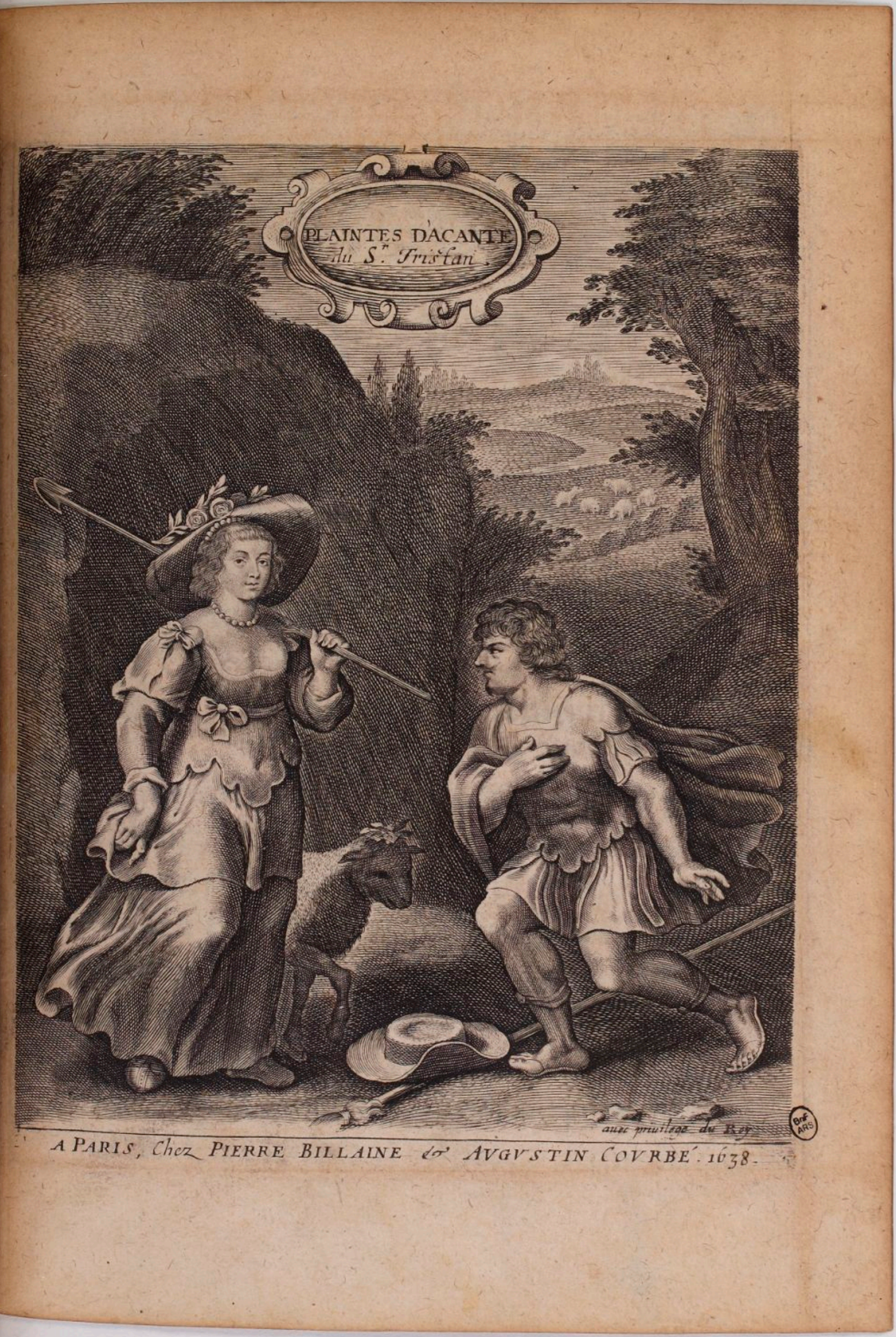 Tristan L'Hermite (1601-1655) - Frontispice des "Plaintes d'Acante", extrait des "Amours" (édition originale de 1638)